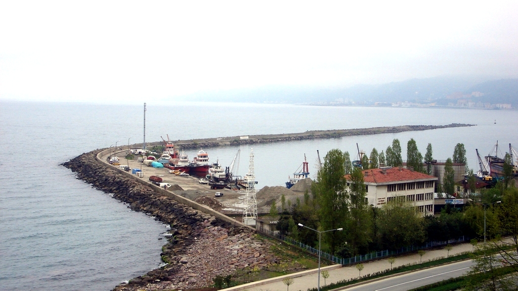 RizeLiman